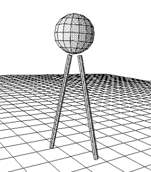 A drawing of biped walking robot model.